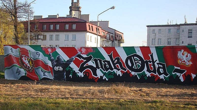 Graffiti kibiców Śląska Wrocław